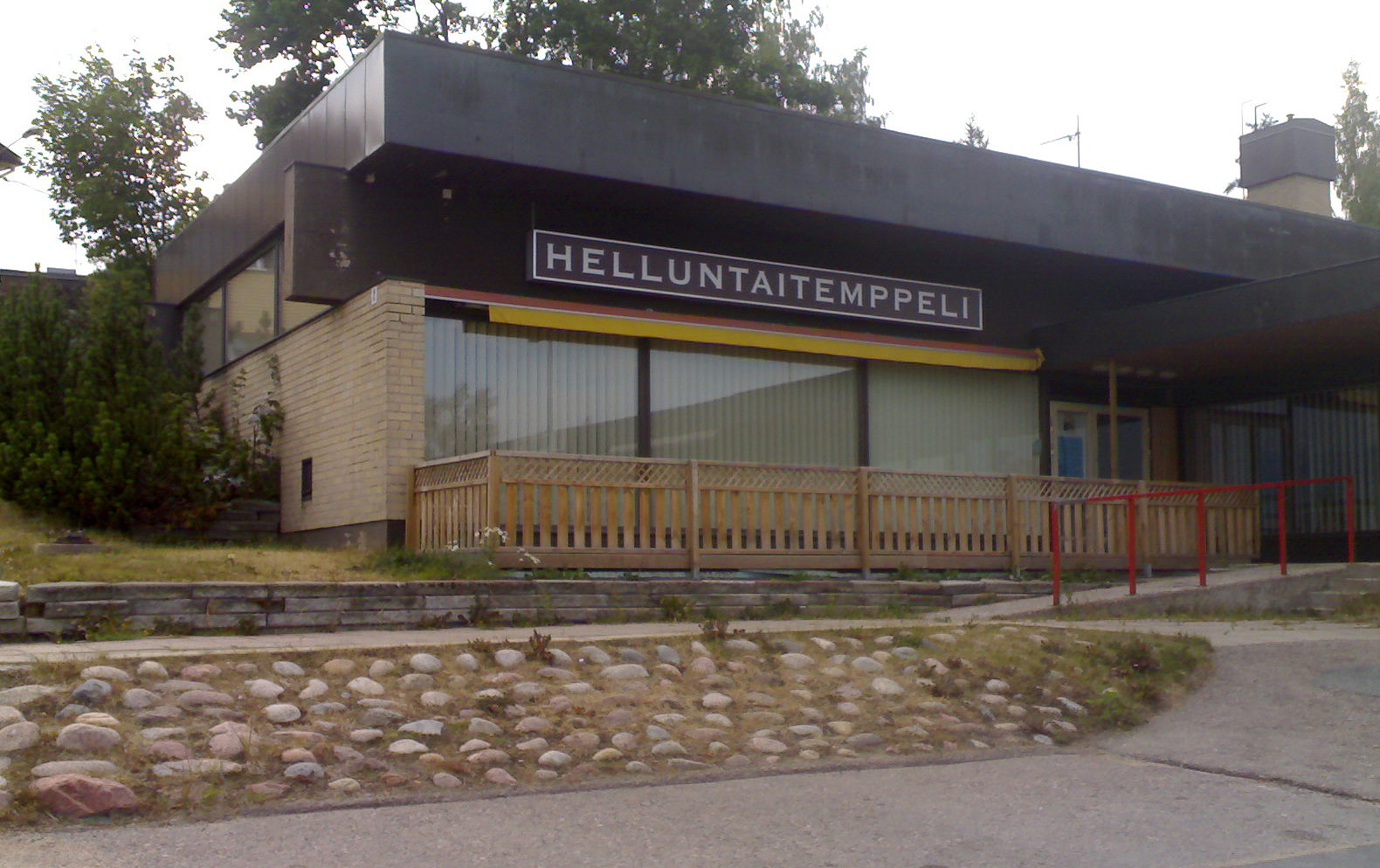 Helluntaiherätyksen toimitila Parkanossa. Self taken with Nokia n70 camphone.